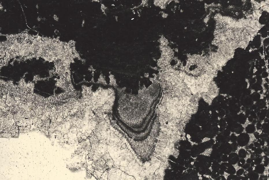 Ciment stalactite au toit d'un "keystone vug" typique de la diagenèse en milieu vadose, au sommet d'un cycle émersif du Lias moyen du Haut Atlas, Maroc. Section de lame mince, dimension env. 0,3 mm.Ænglisc: Stalactitic cement in a keystone vug ("birdseye"), a diagenetic feature characteristic of the vadose zone on top of a regressive, "shallowing upward" cycle. Middle Lias of the high Atlas, Morocco. Thin section, length about 0,3 mm.